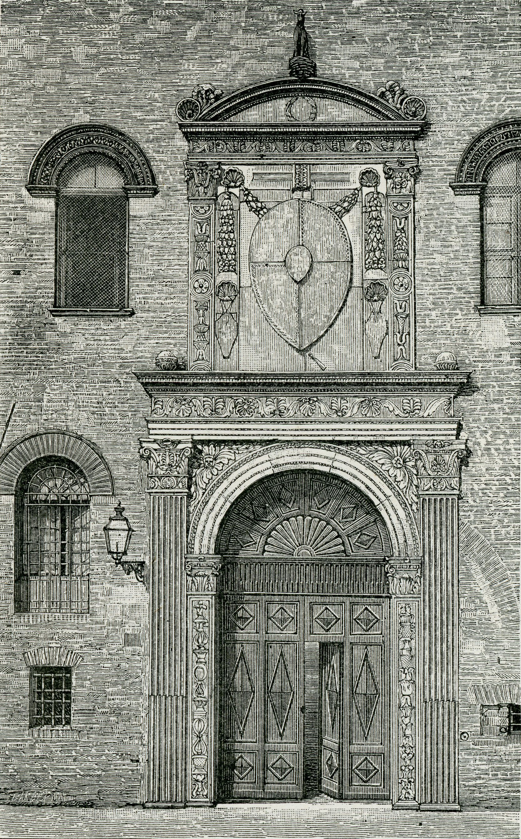 Ferrara: Porta del palazzo Schifanoja, (xilografia di Giuseppe Barberis).